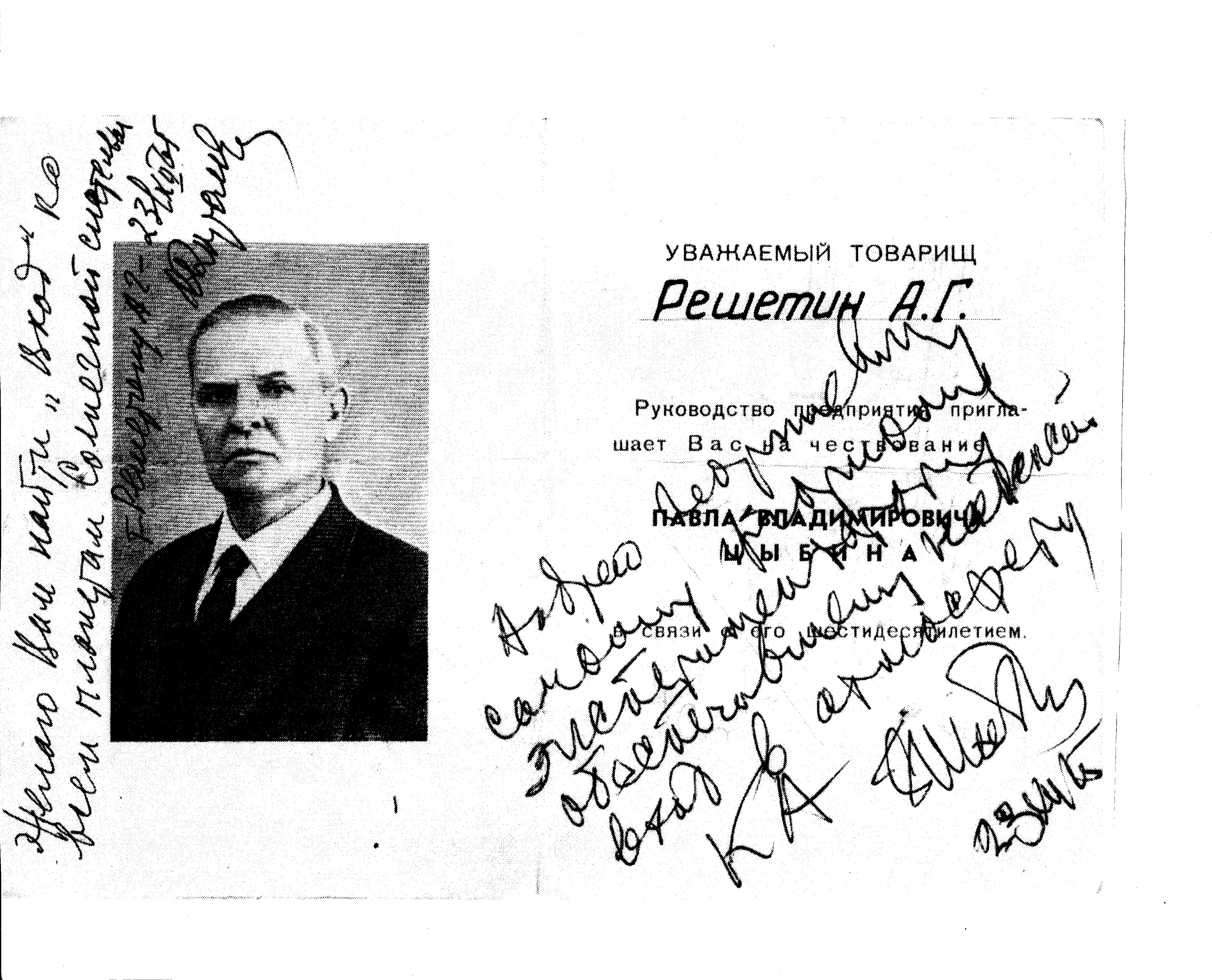 С.П.Королев пожелание А.Г.Решетину: Желаю Вам найти "Вход" во все планеты солнечной системы